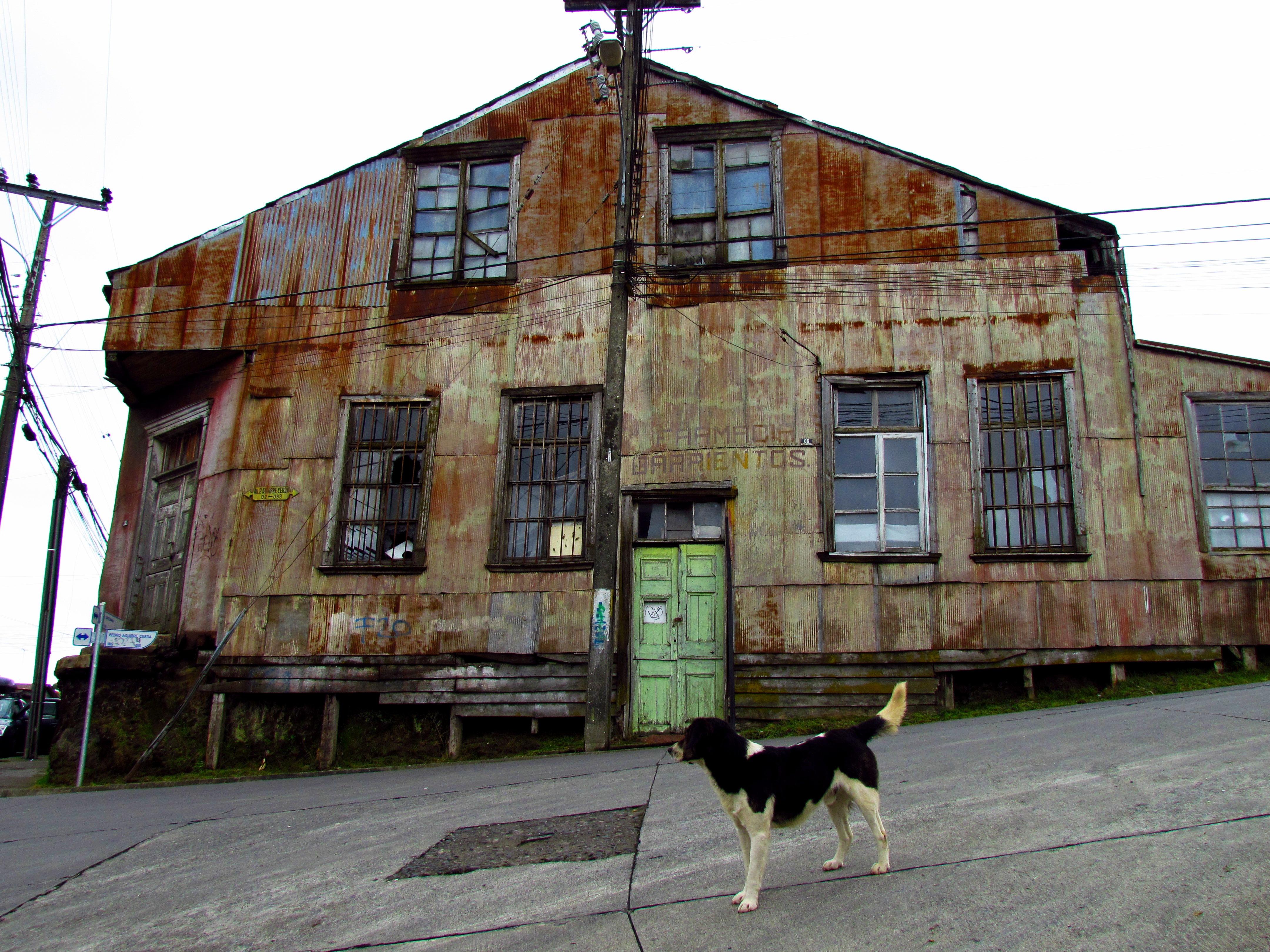 Casa en calle Centenario This is a photo of a national monument in Chile: 1694